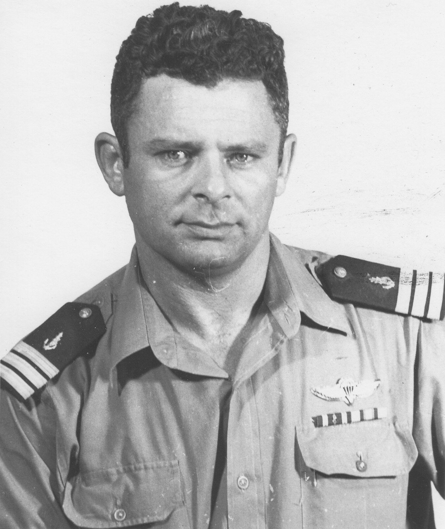 סא"ל מנחם כהן בעת שרותו כמפקד איזור ים סוף